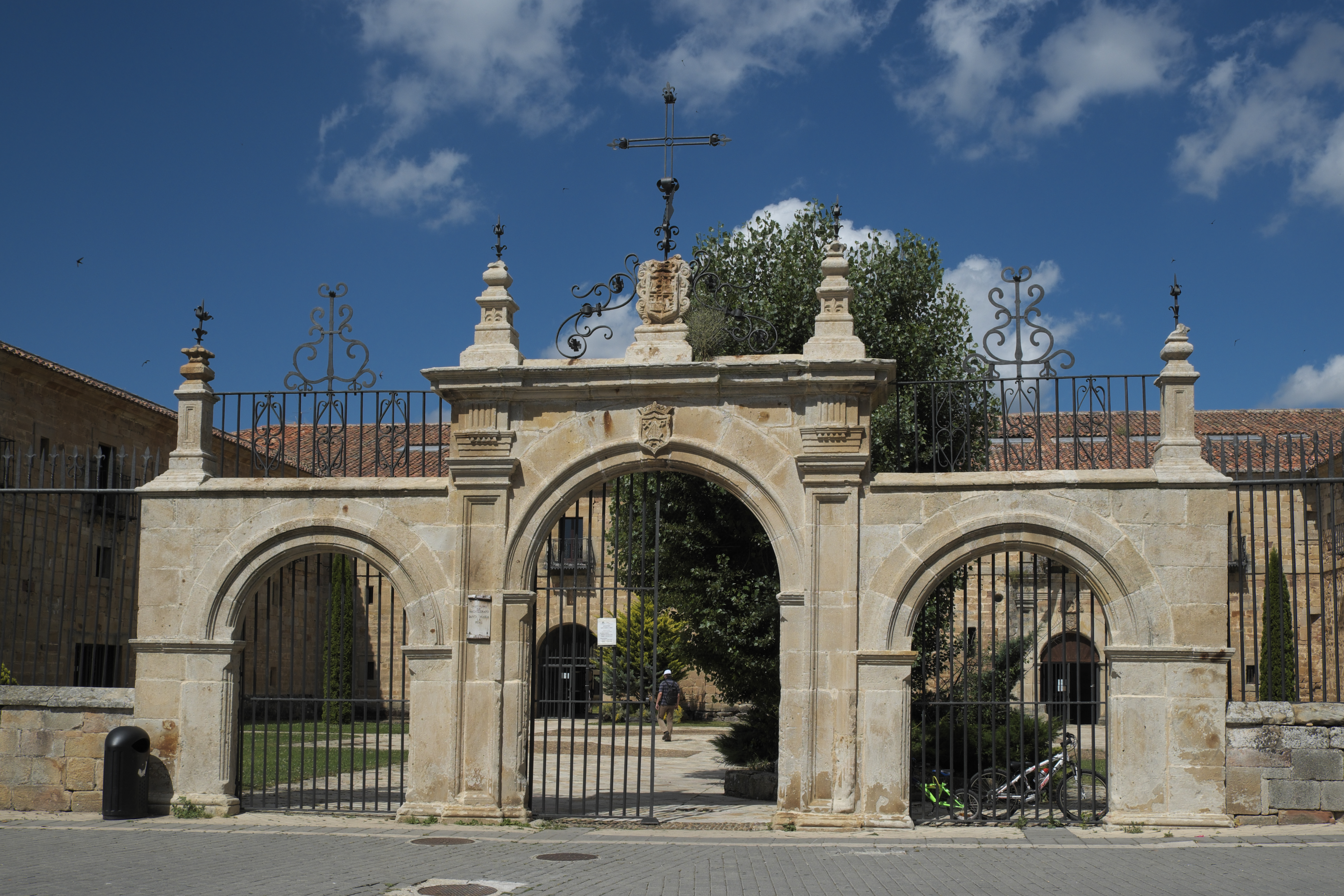 Ehemaliges Prämonstratenserkloster Santa María la Real in Aguilar de Campoo in der Provinz Palencia (Kastilien-León/Spanien), Eingang